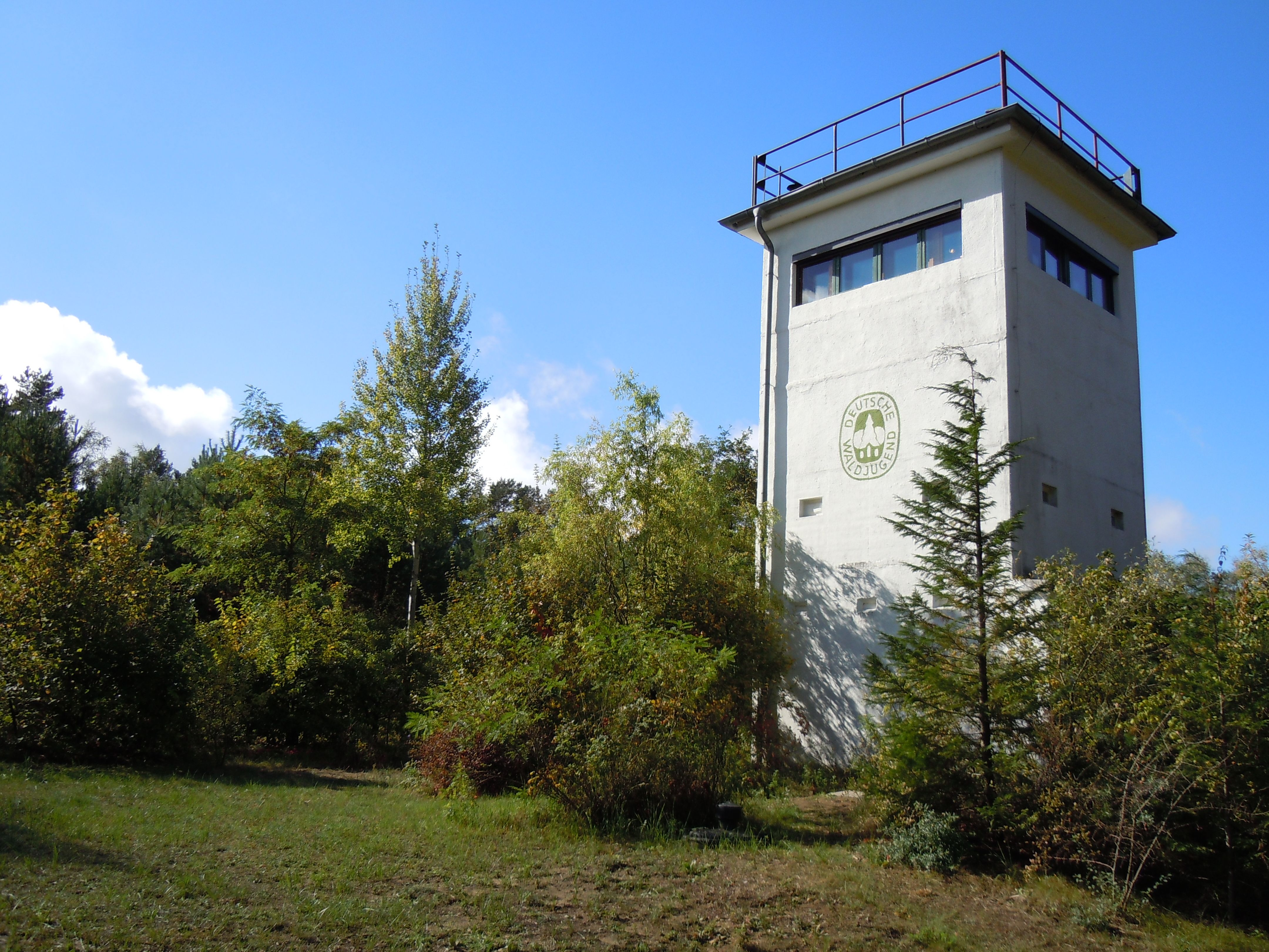 ehemaliger Grenzwachturm, heute: Deutsche Waldjugend - Naturschutzturm - Berliner Nordrand e.V.